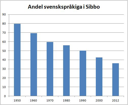 Andel svensktalande i Sibbo 1950-2012. Källa